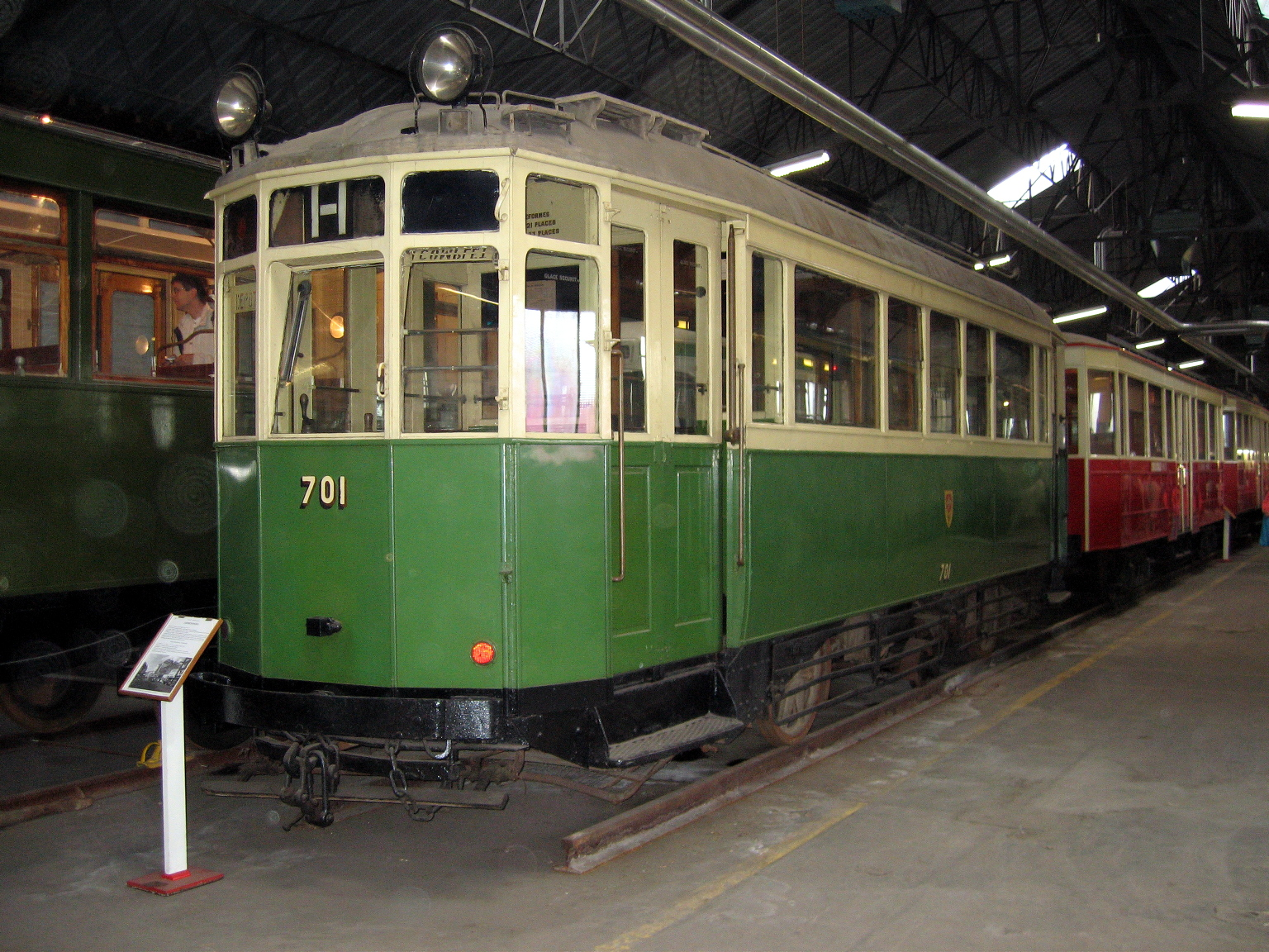 Ancien tramway de Lille, AMTUIR 15/09/2007.